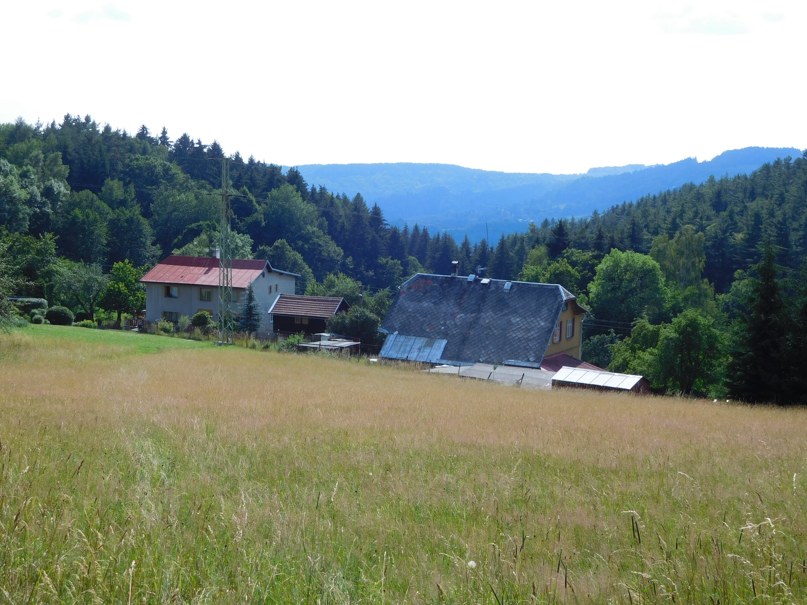 Veselí - pohled od východu (č.p. 11 a 14)